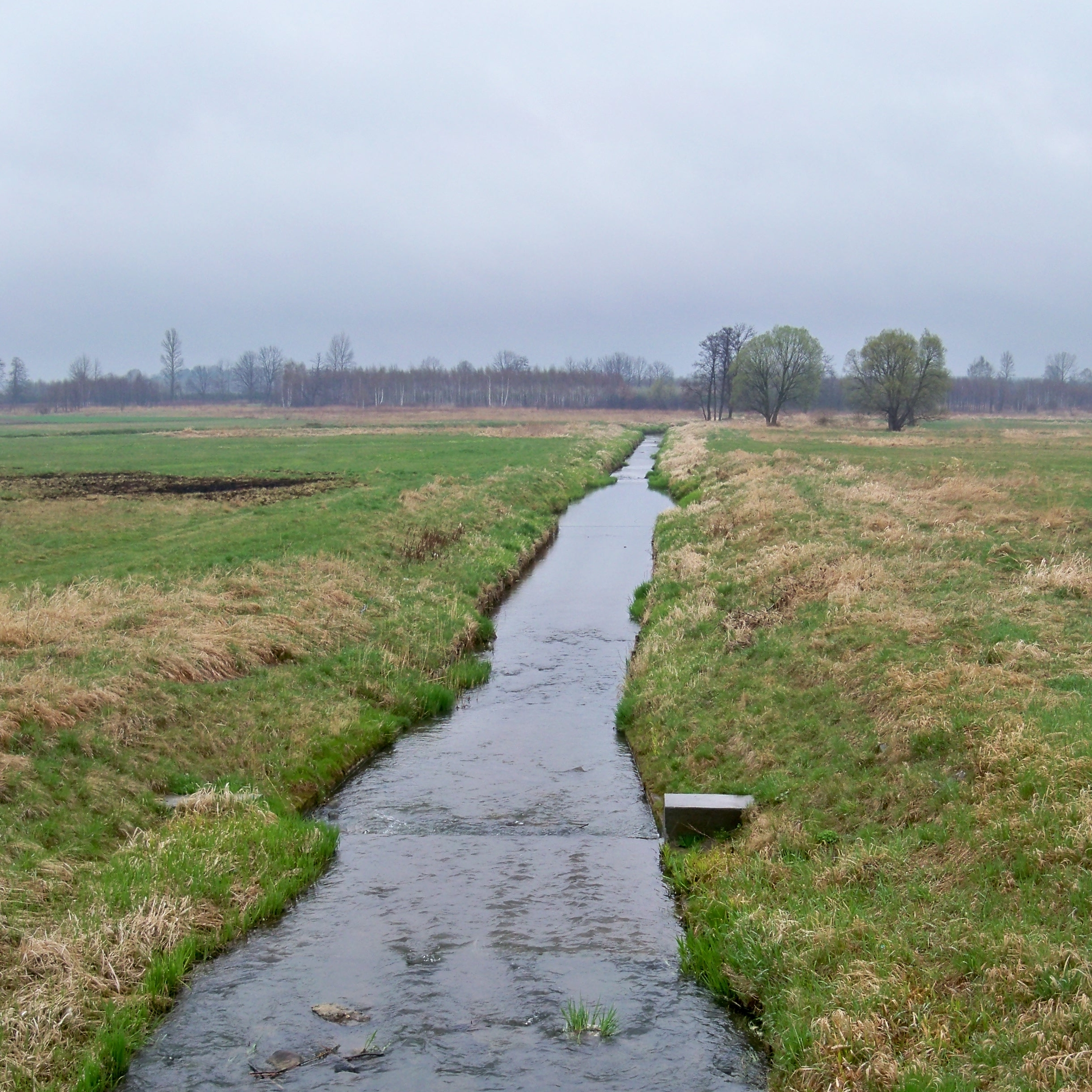 Uregulowana część Trzebośnicy między Kątami Trzebuskimi (po lewej) a Trzebosią (po prawej), tzw. Porąbka